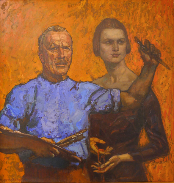 Eingebung